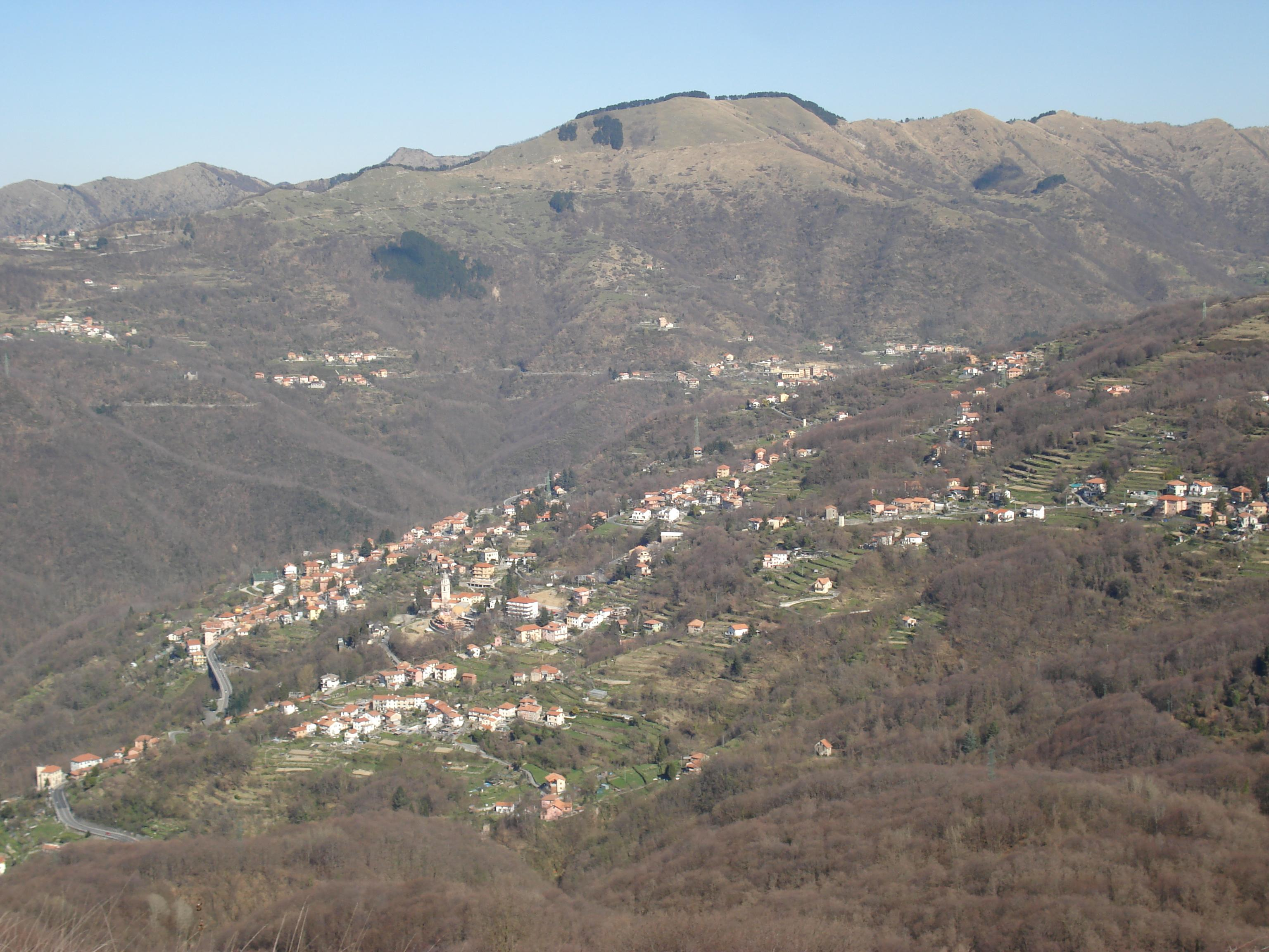 Cosmin latan,Bargagli